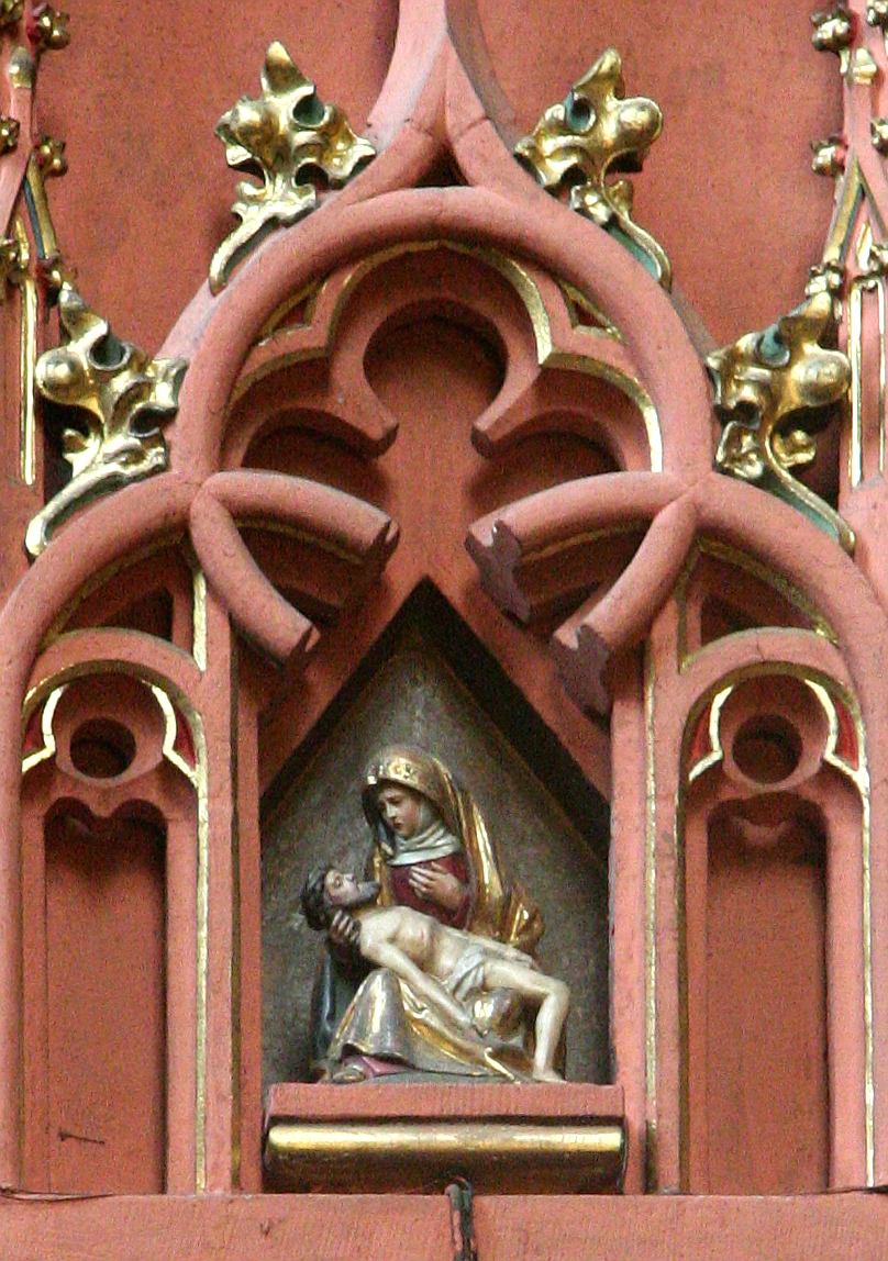 Gnadenbild aus der Zeit um 1450 in der Wallfahrtskirche Klausen